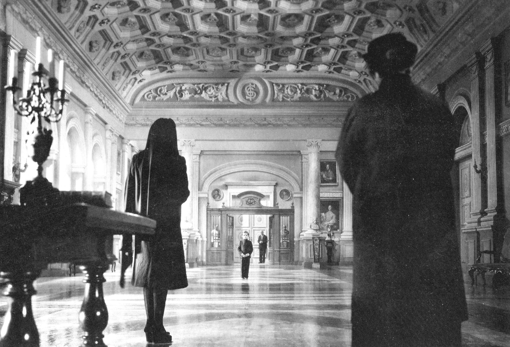 Scena finale nel collegio de "I bambini ci guardano" (De Sica, 1943)